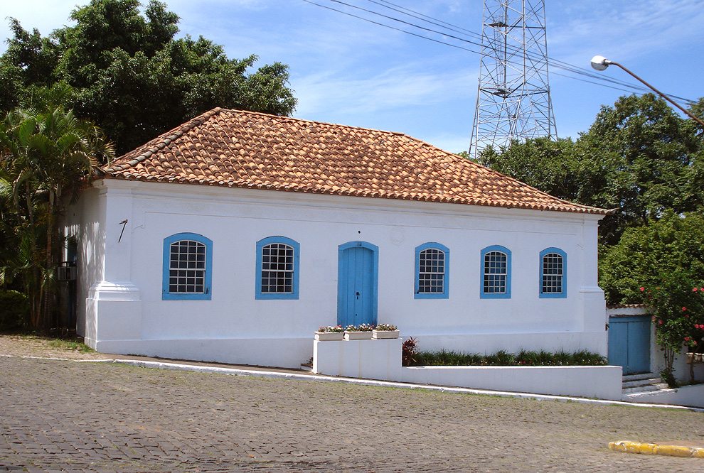 Antiga Casa de Luiz Barreto, hoje a Secretaria de Educação de Triunfo, Rio Grande do Sul, Brasil.